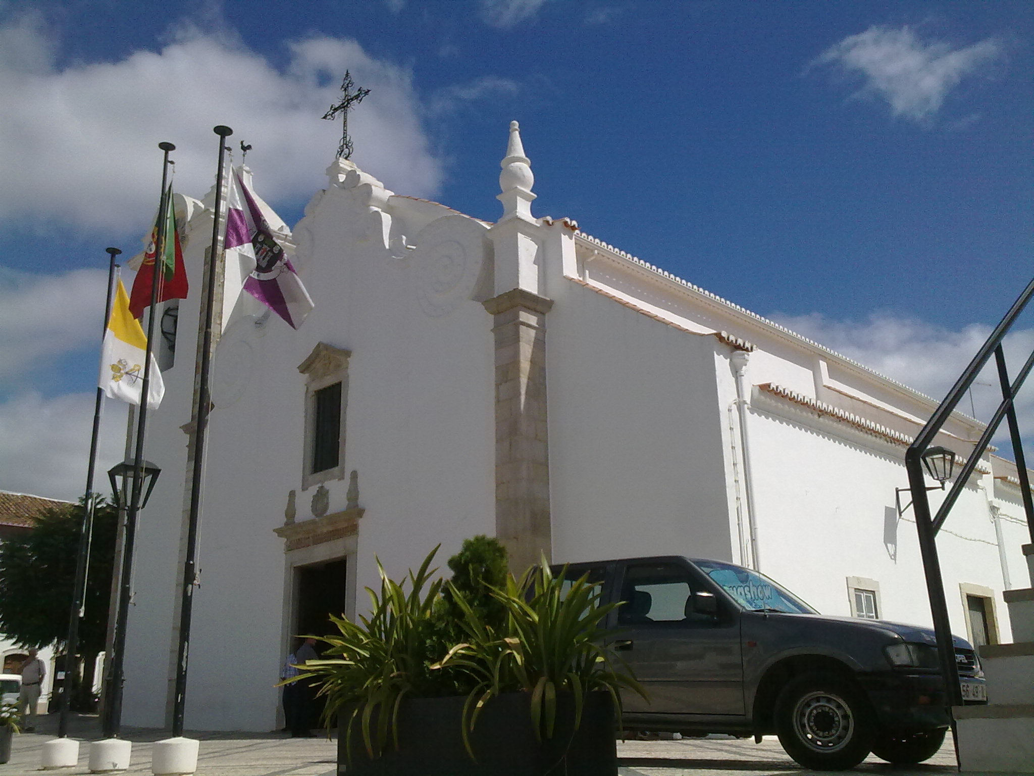 Igreja paroquial de Boliqueime, no Algarve, em Portugal.